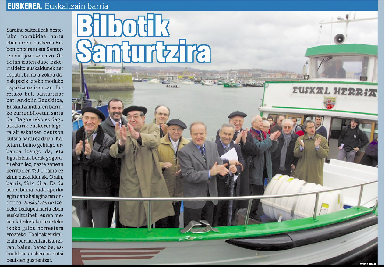 Euskatzaindia Santurtzira Andolin Eguskitza euskaltzain izendatzera. 2002-02-23